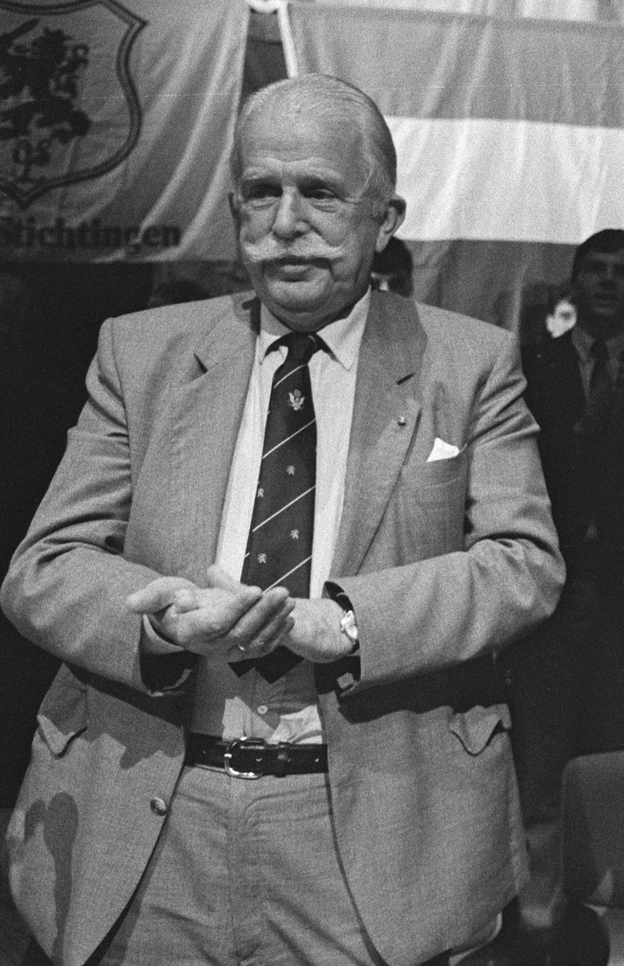 Landelijke bijeenkomst OSL in Apeldoorn; CdK in Friesland Wiegel , mr. Baron van Hemert tot Dingshof , rechts Beelaerts van Blokland